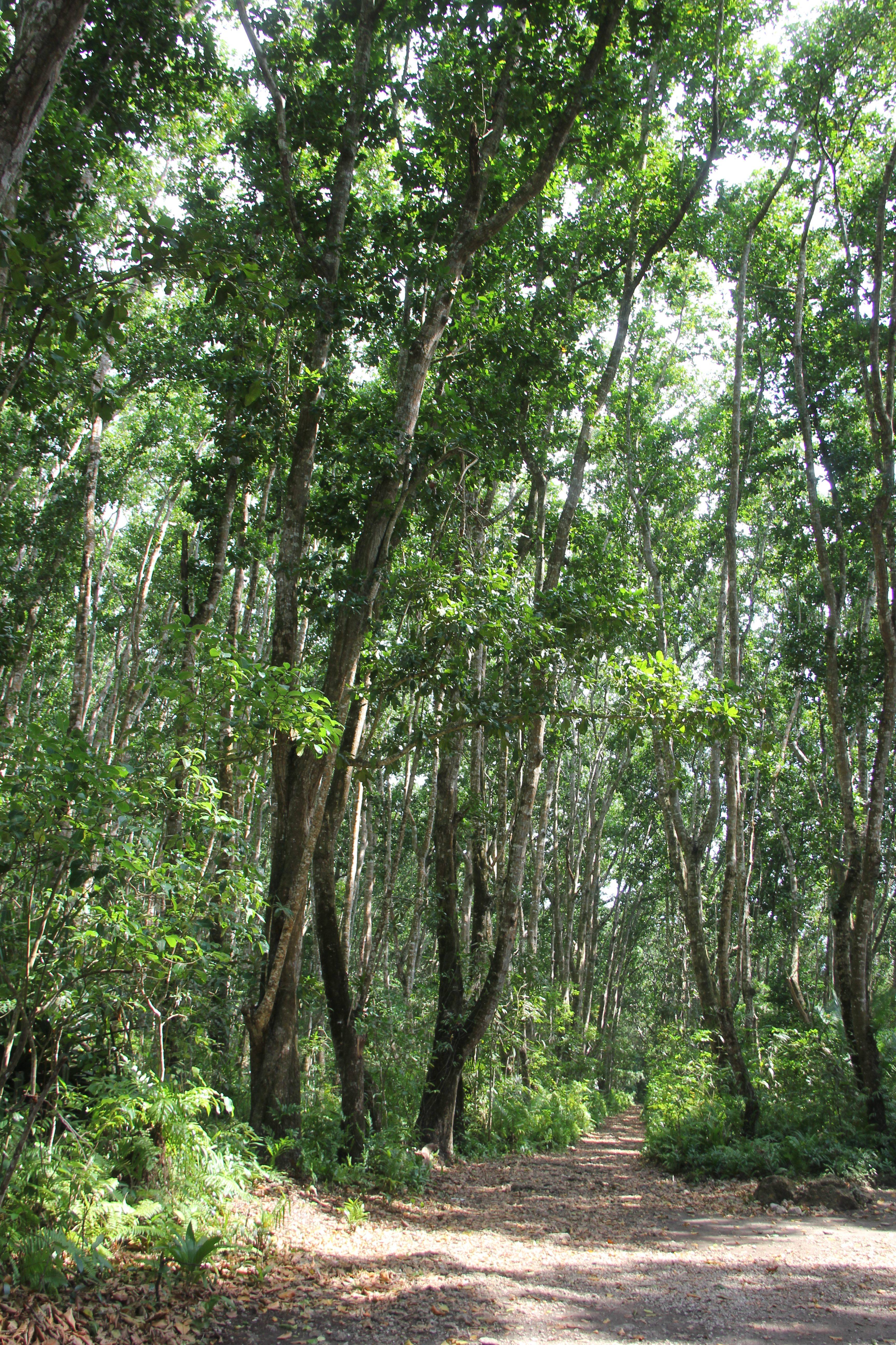 Jozani Forest